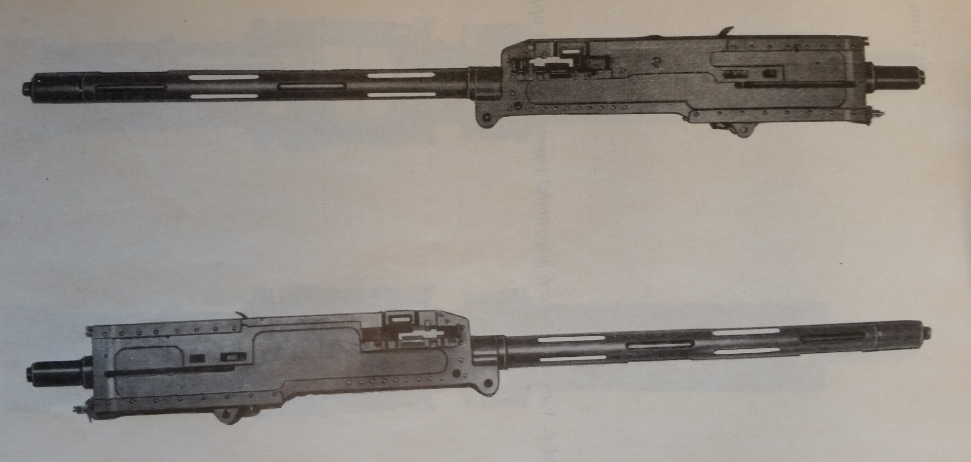 En bild som visar båda sidorna av en akan m/39